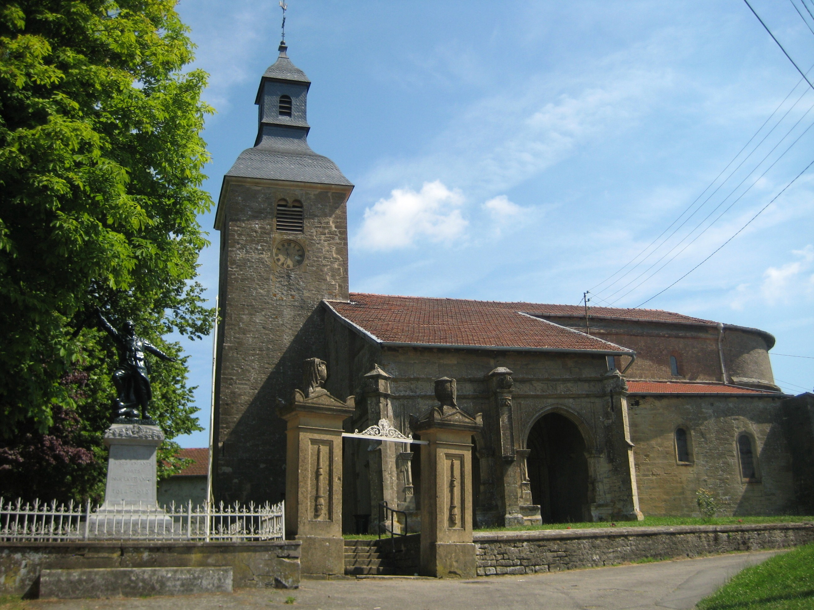 Description Église paroissiale Saint-Martin de Mairy (commune de Mairy-Mainville - Meurthe-et-Moselle) Date26 June 2009Sourcemon appareil photoAuthorAimelaime Église paroissiale Saint-Martin de Mairy (commune de Mairy-Mainville - Meurthe-et-Moselle)